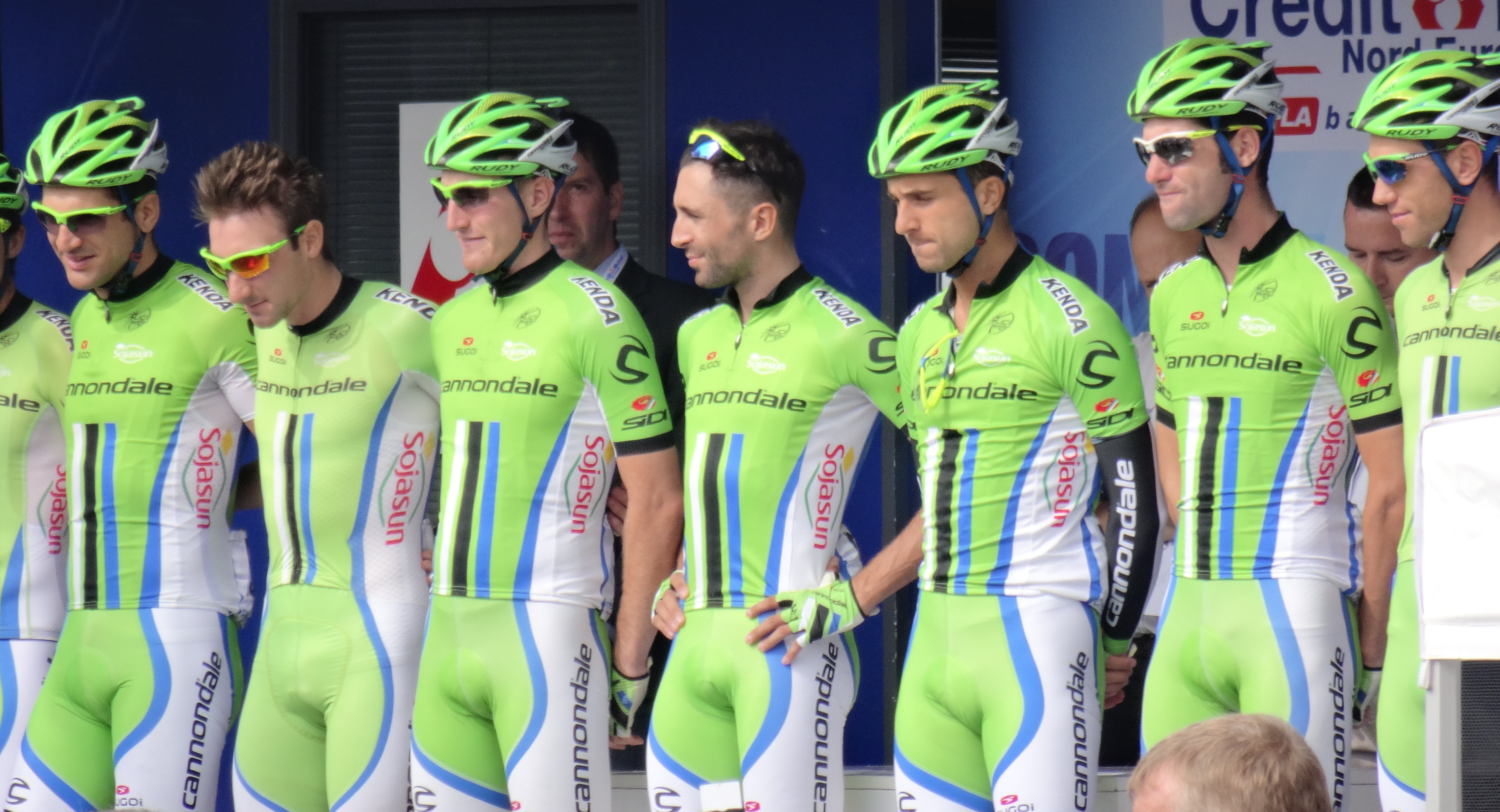 Reportage photographique réalisé le dimanche 7 septembre à l'occasion du départ et de l'arrivée du Grand Prix de Fourmies 2014 à Fourmies, Nord-Pas-de-Calais, France.